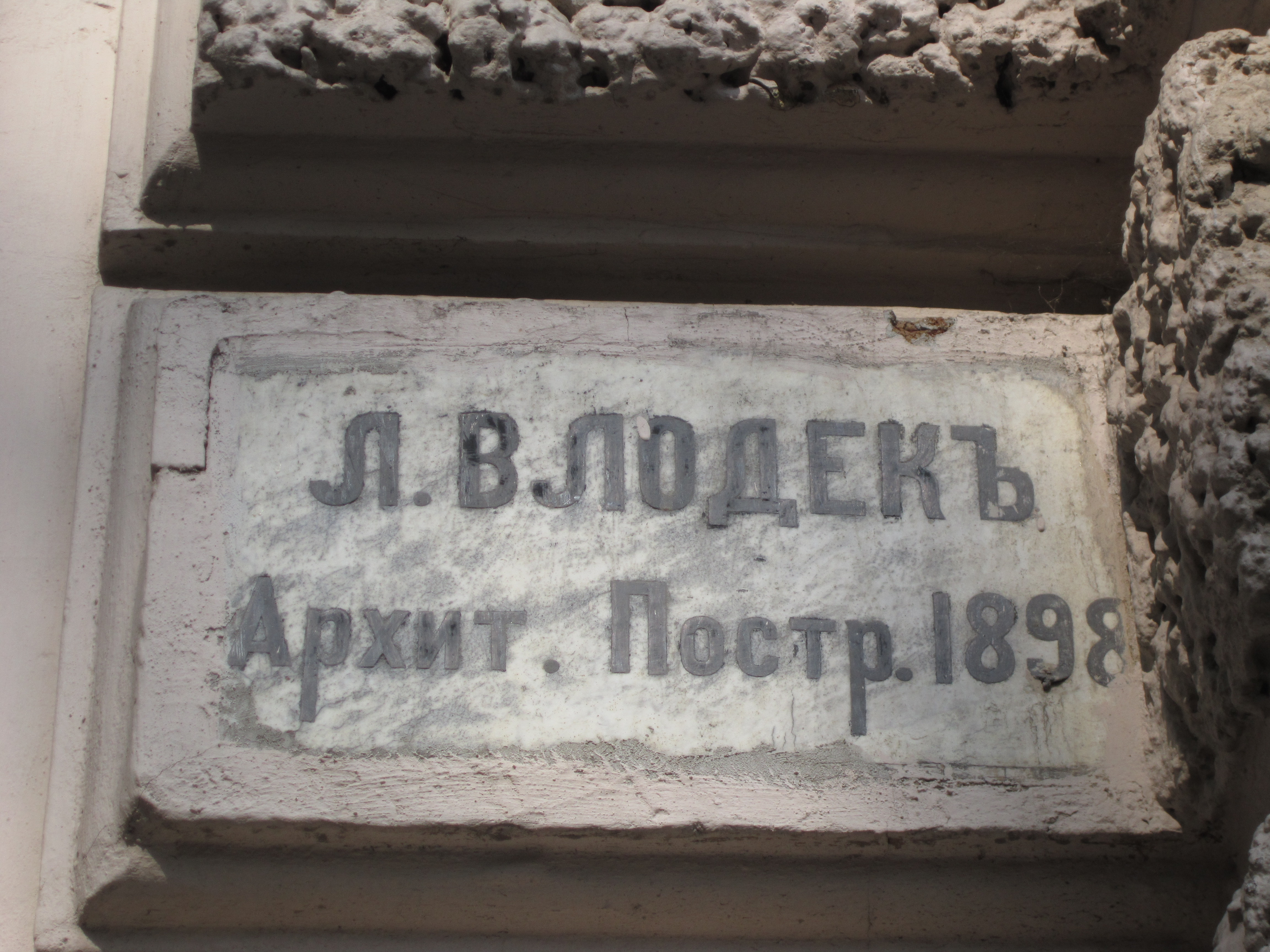 Будинок житловий Влодека,у якому жив Є.М. Брусиловський - ревматолог, бальнеолог, лимановед, засновник і перший директор артеріологічної кліники, беззмінний голова Одеського бальнеологічного товариства професор, Одеса, Новосельського вул., 79